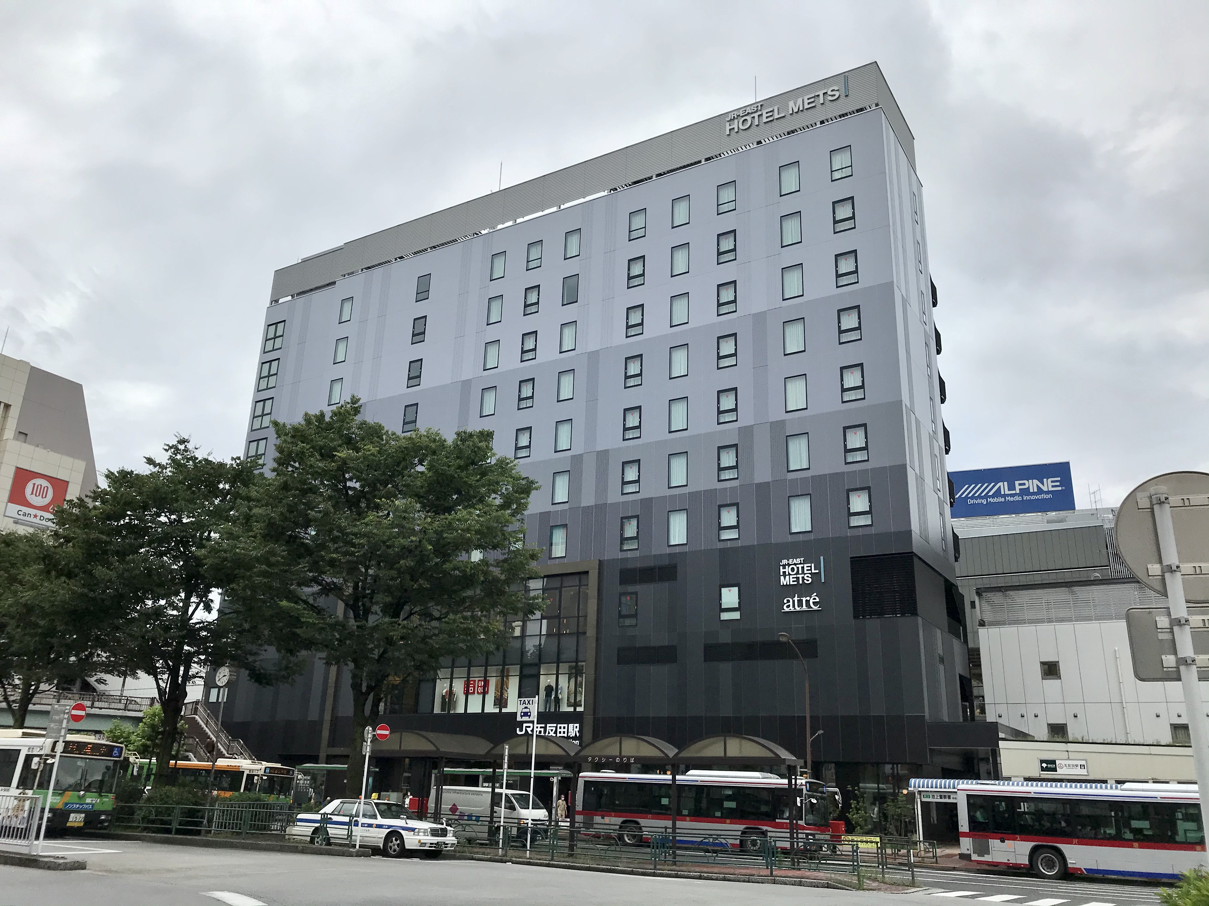 JR東日本山手線五反田駅東口駅舎及びアトレ五反田